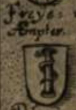 Wappen der Freien Ämter (Freÿe Æmpter), im Buch von Josias Simmler: Von Dem Regiment loblicher Eidgnoschafft, Zürich, 1645.